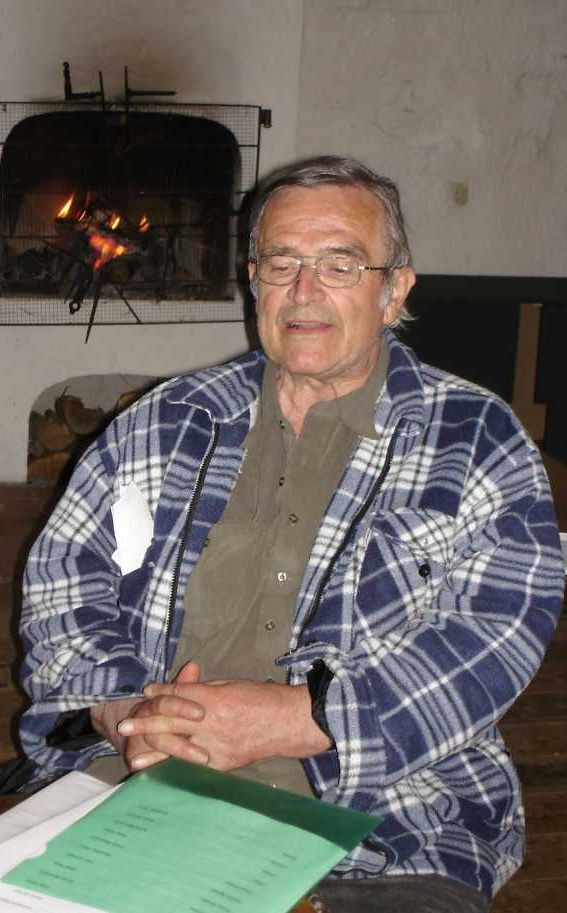 Dr. Peter Kleinschmidt bei den Probenarbeiten zur "Maikäferkomödie" von J.V. Widmann im Mai 2008 im Rittersaal zu Loipfing/Isen